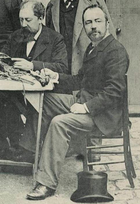 Léonce-Pierre Manouvrier (à droite) examinant avec d'autres spécialistes, comme Marceau Bilhaut (à gauche), des ossements exhumés du cimetière Sainte-Marguerite et autrefois attribués à Louis XVII.